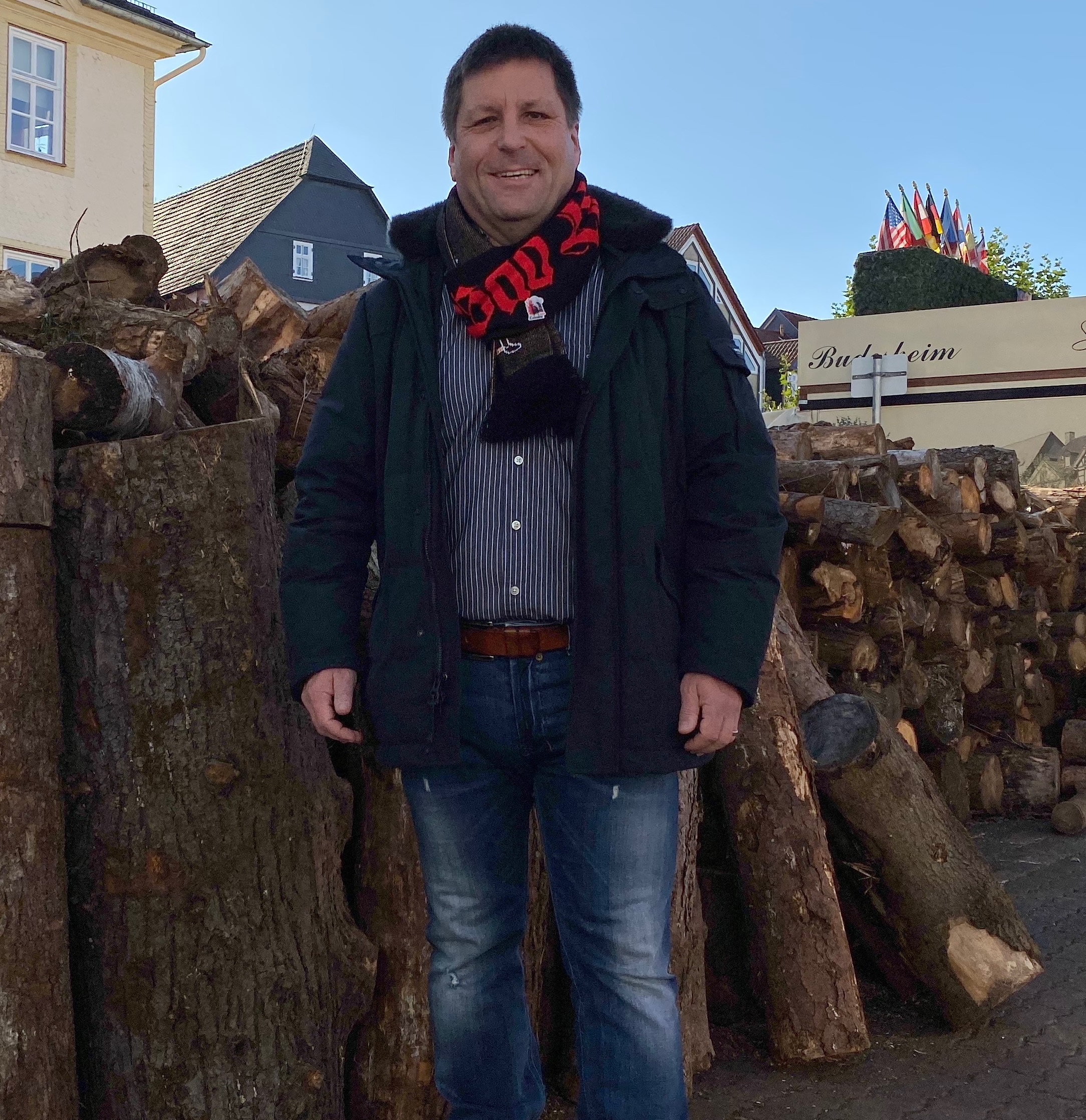 Thomas Fehling vor dem Lullusfest 2019